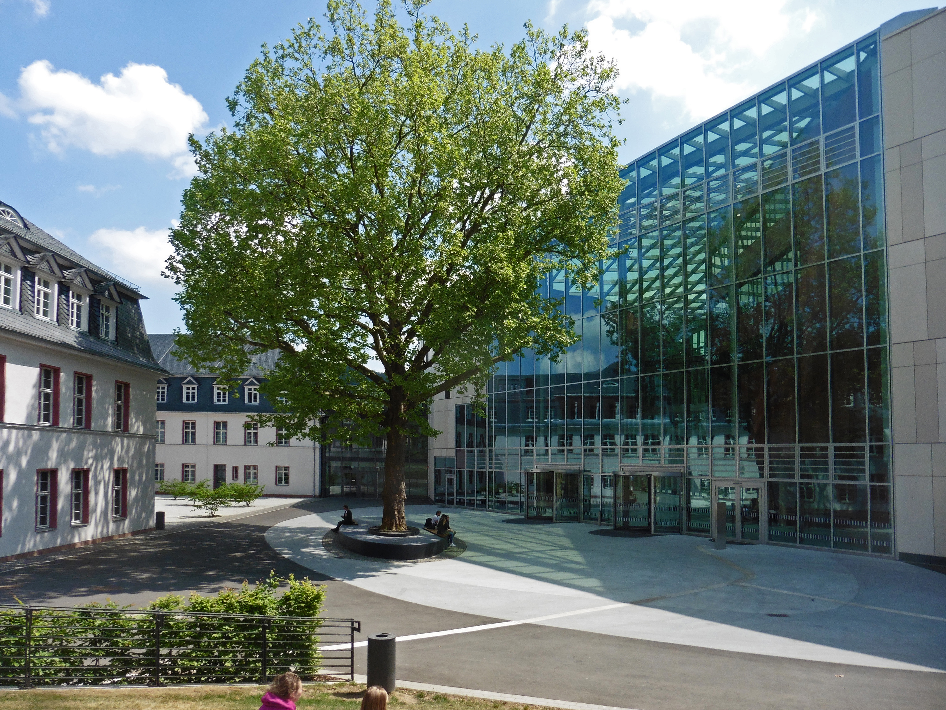 Neubau der Universitätsbibliothek in Marburg, Eingang Deutschhausstraße. Ansicht von Westen.